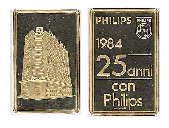 Lingotto d'oro della Philips S.p.A. Italia per 25 anni di servizio 1959-1984 - sul dritto la sede di piazza IV Novembre, 3 Milano - edificio costruito nel 1948 come sede dell'azienda olandese in Italia